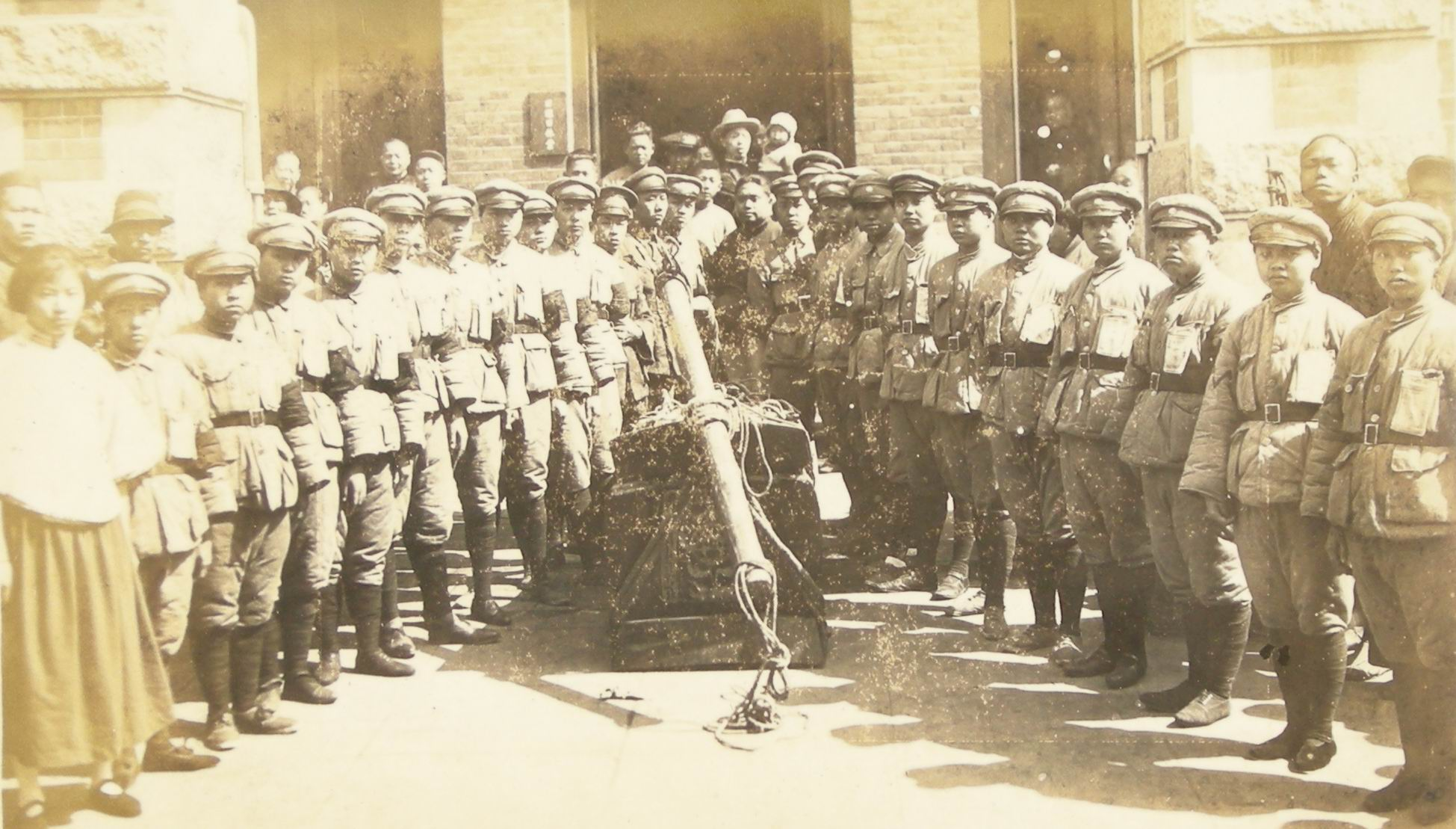 北伐期の国民革命軍女性兵士